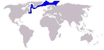 Bewerking afbeelding: Afbeelding_(kaart).JPG